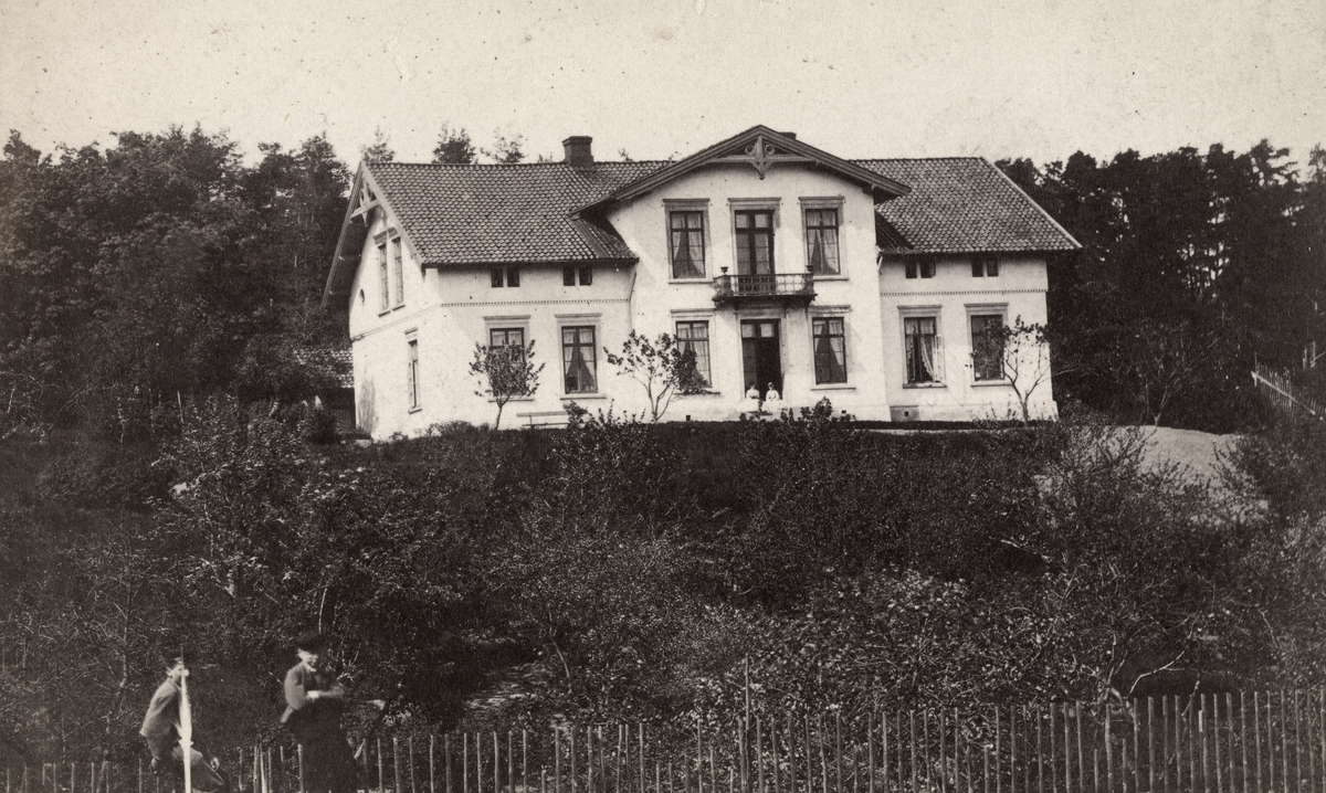 Villa Solbakken (Solbakken løkkehus) i Skovveien 39C. Ukjent fotograf, ca. 1870. Fra Oslo Museums samling.